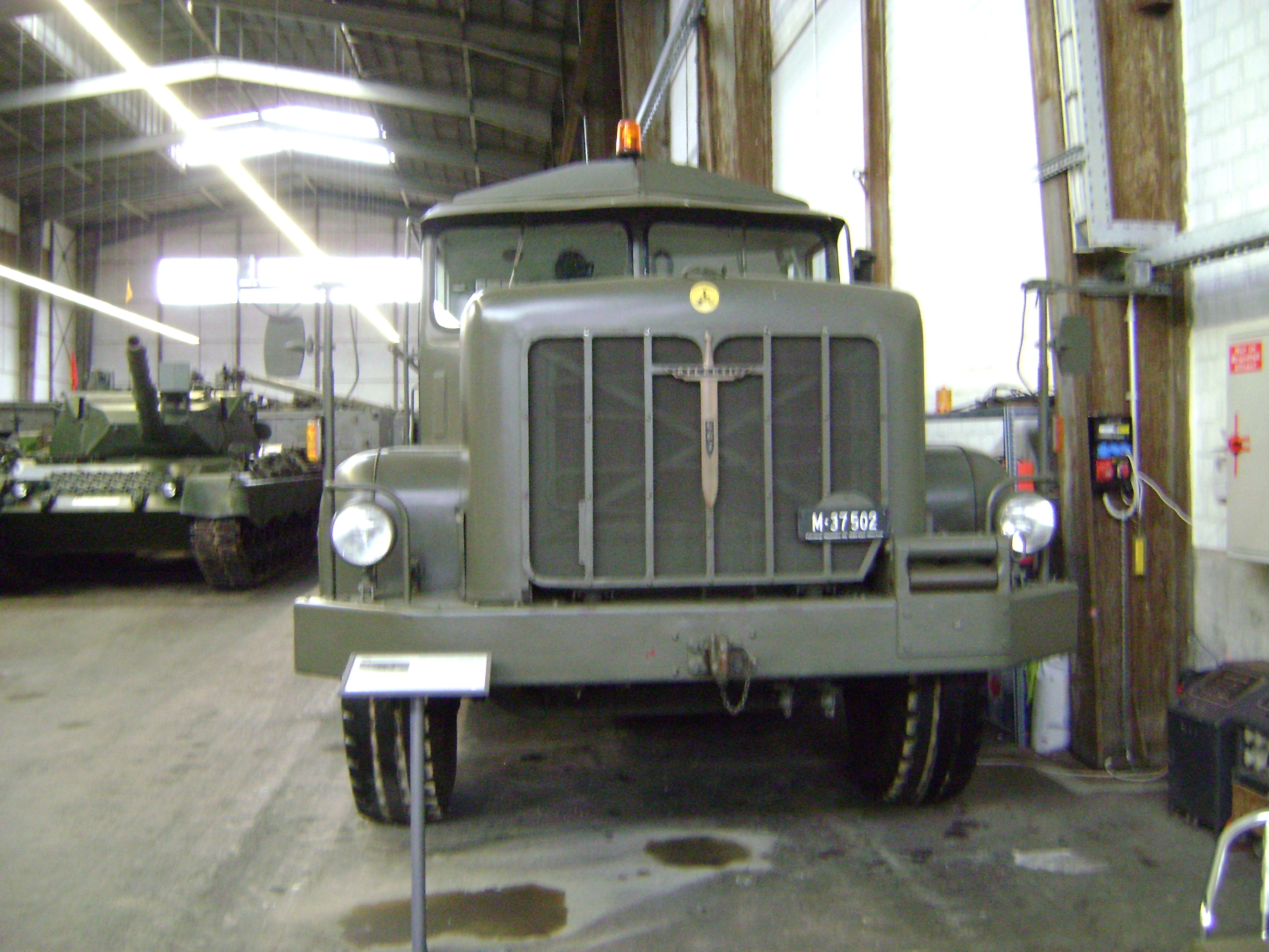 Rotinoff